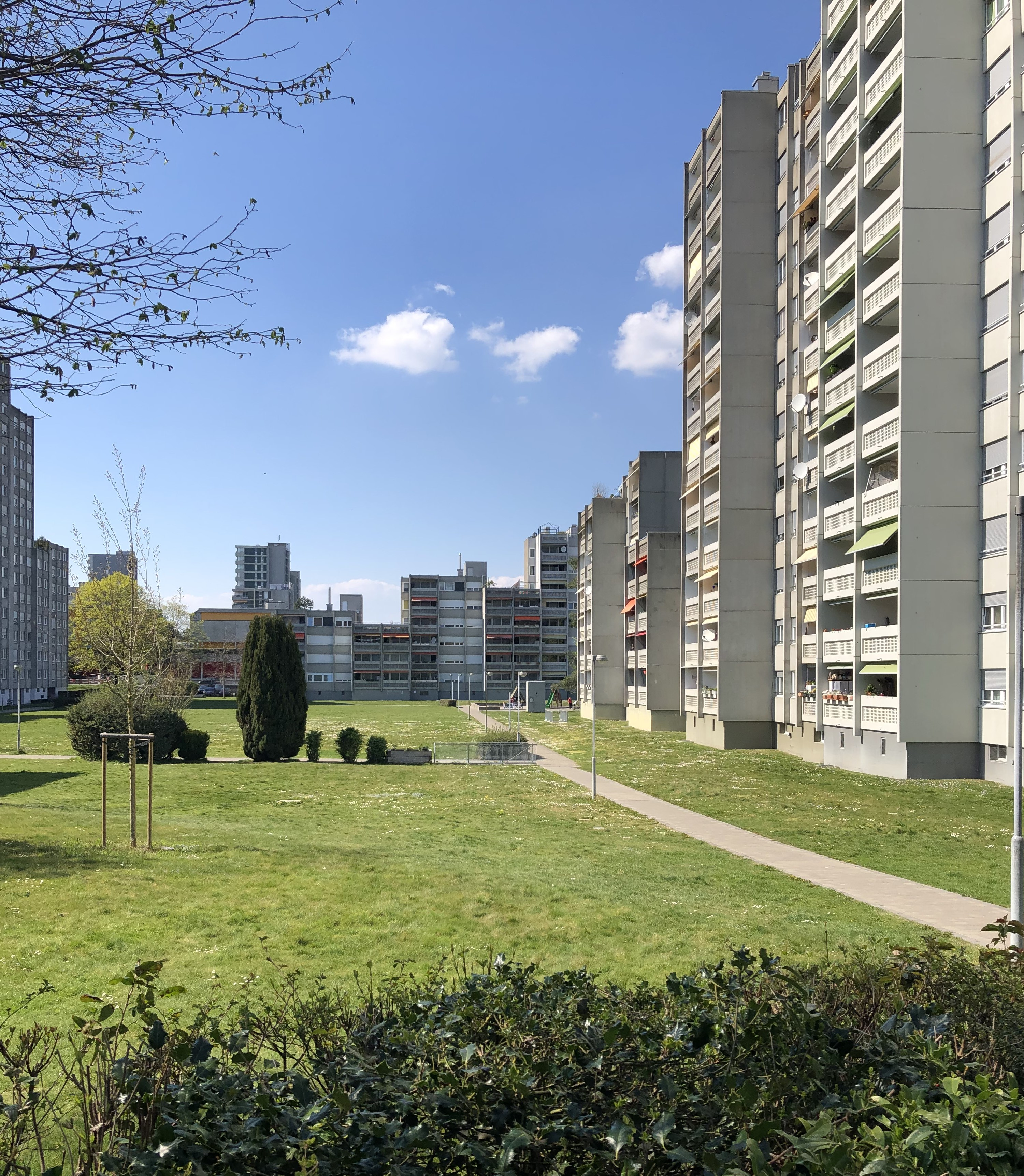 Kleefeld Bebauung Neubauten